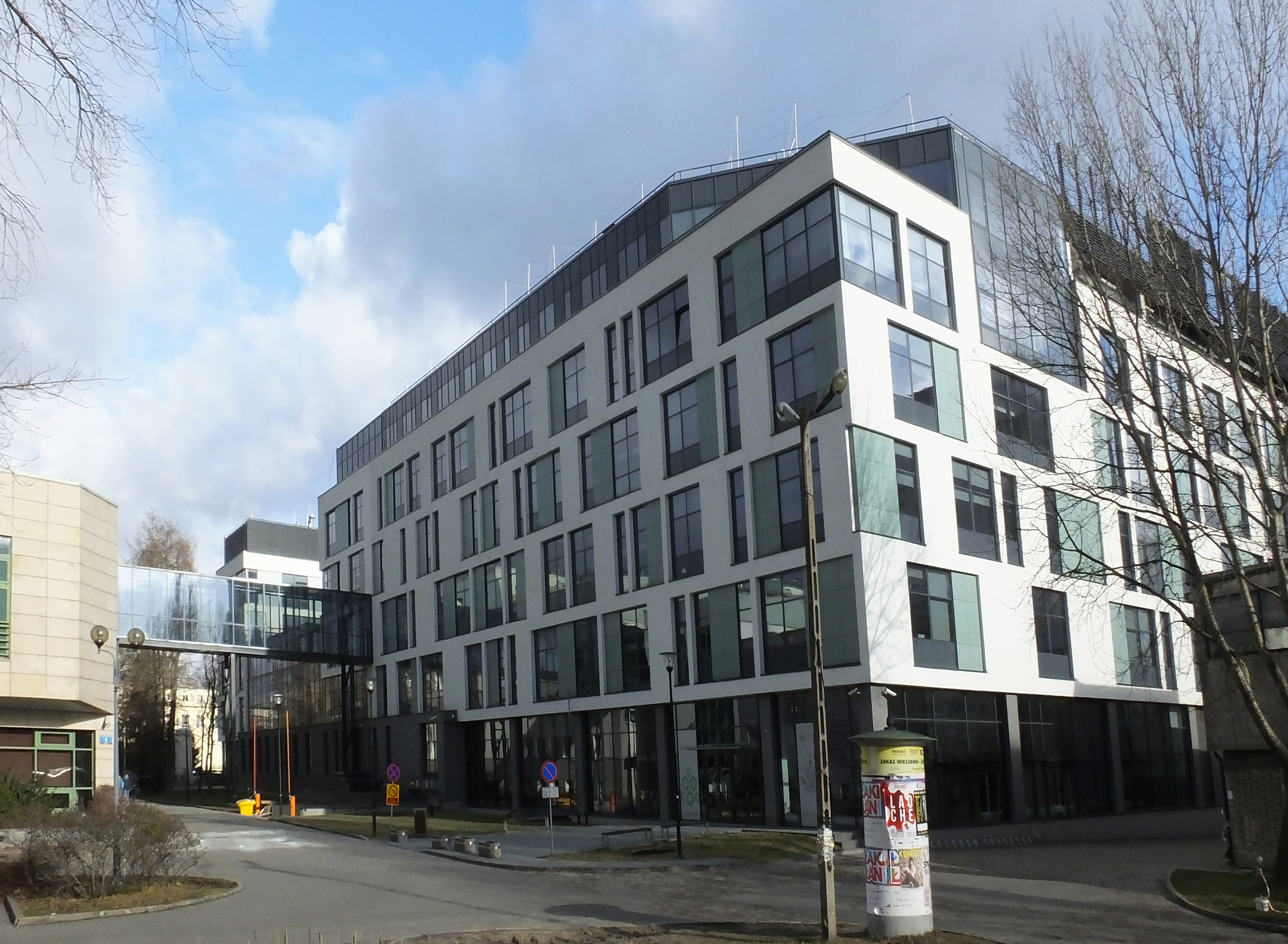 Centrum Nauk Biologiczno-Chemicznych Uniwersytetu Warszawskiego (CeNT III)